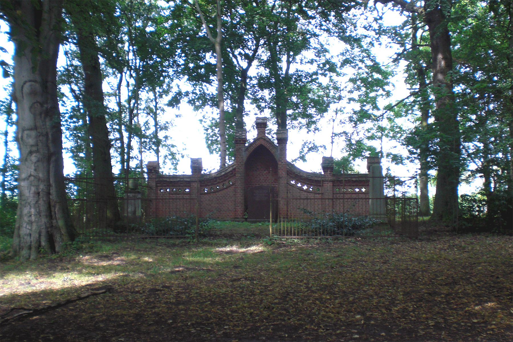 Die Grablege mit Gruft befindet sich im Gutspark in der Nähe des Sees. Ein großer Stein erinnert an Franz Freiherr von der Kettenburg (* 22. November 1841 in Matgendorf; † 29. November 1899 in Mentone), Hans Freiherr von der Kettenburg (* 19. Juni 1870 in Faal; † 4. Juni 1904 in Matgendorf) und Cuno Freiherr von der Kettenburg (* 22. November 1902 in Matgendorf; † 14. August 1904 in Matgendorf), außerdem ein älterer Pfeiler Sophie Ulrique von der Kettenburg (* 18. Februar 1780; † 22 November 1814), geb. von der Lühe.